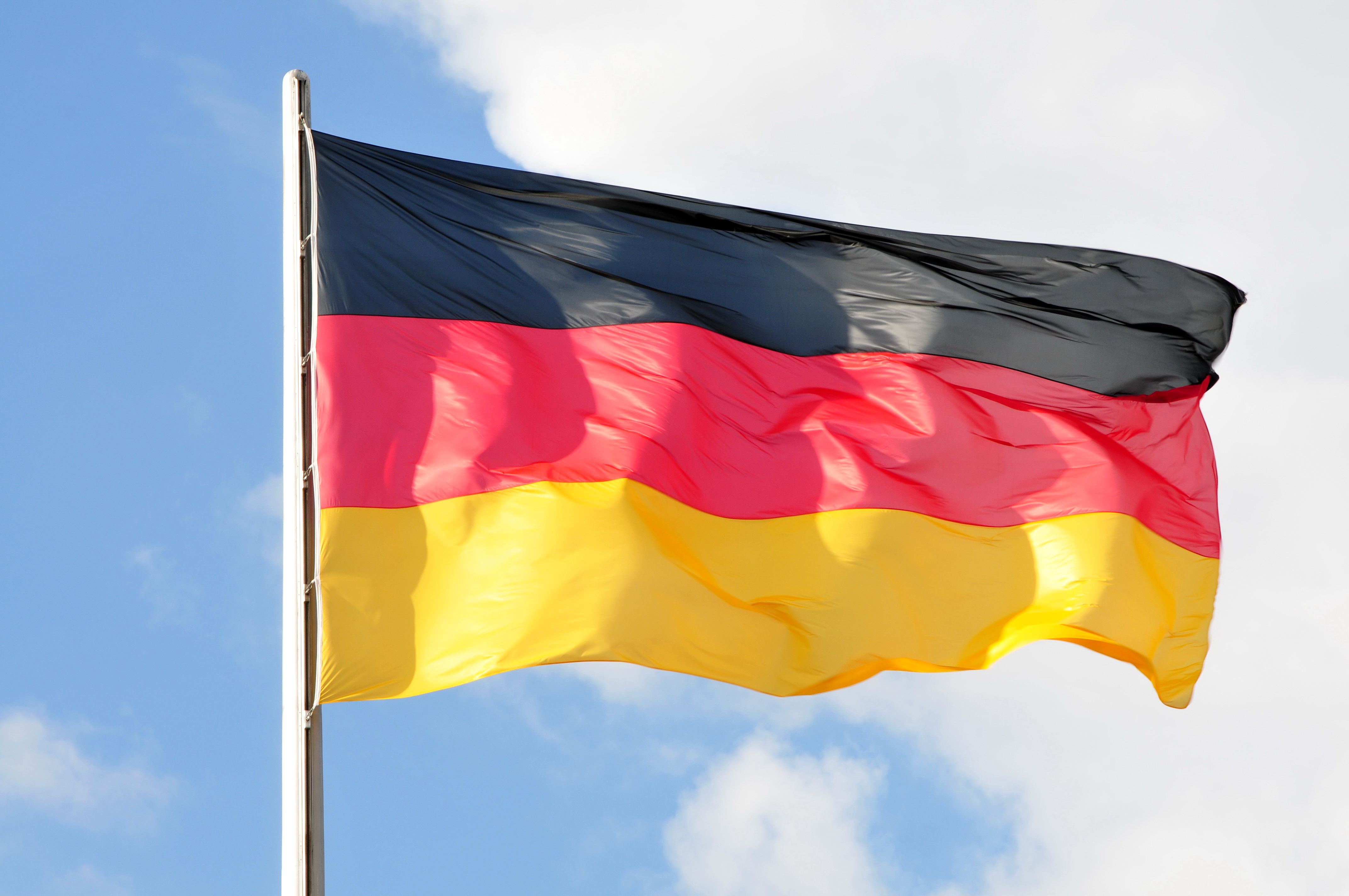 Bundestag The making of this document was supported by the Community-Budget of Wikimedia Germany. Wikipedia-Bundestagsprojekt 2014 8–12 September 2014 in BerlinThis file was taken during the project “Wiki loves parliaments/Bundestag 2014” (German). Organisation: Martin Rulsch, Olaf KosinskyDesign: Martin KraftPhotography: Foto-AG Gymnasium Melle (Jan-Kristof Blömke, Lukas Eismann, Moritz Kosinsky, Laura Lessing, Karsten Mosebach, Mascha Mosebach, Teresa Schreer, Noah Sewöster, Niklas Tschöpe), Olaf Kosinsky, Martin Kraft, Harald Krichel, Steffen Prößdorf, Ralf Roletschek, Martin Rulsch, Gerd Seidel, Sven TeschkeVideo: Marc Rudnick, Manuel SchneiderEditors: Marcus Cyron, Günter Fremuth, Martin Kraft, Robin Krahl, Harald Krichel, Martin Rulsch, WikiAnikaReception: DasMonstaaa, Leonie Rabea Große, Lutheraner, Nina Möllering, Martin Rulsch, WikiAnika, Foto-AG Gymnasium MelleCosmetics: Regina Bosak, Bettina Dieguez, Sandra Kobbe, Andrea Strehlke; Irada Abdullayeva, Vivien Abelmann, Olena Engelbrecht, Sarah Fabini, Nina Magnus, Jacqueline Schmidt, Leonie Taboada, Julia Willer Usage information If you need more information how to use this file, please send an email to .